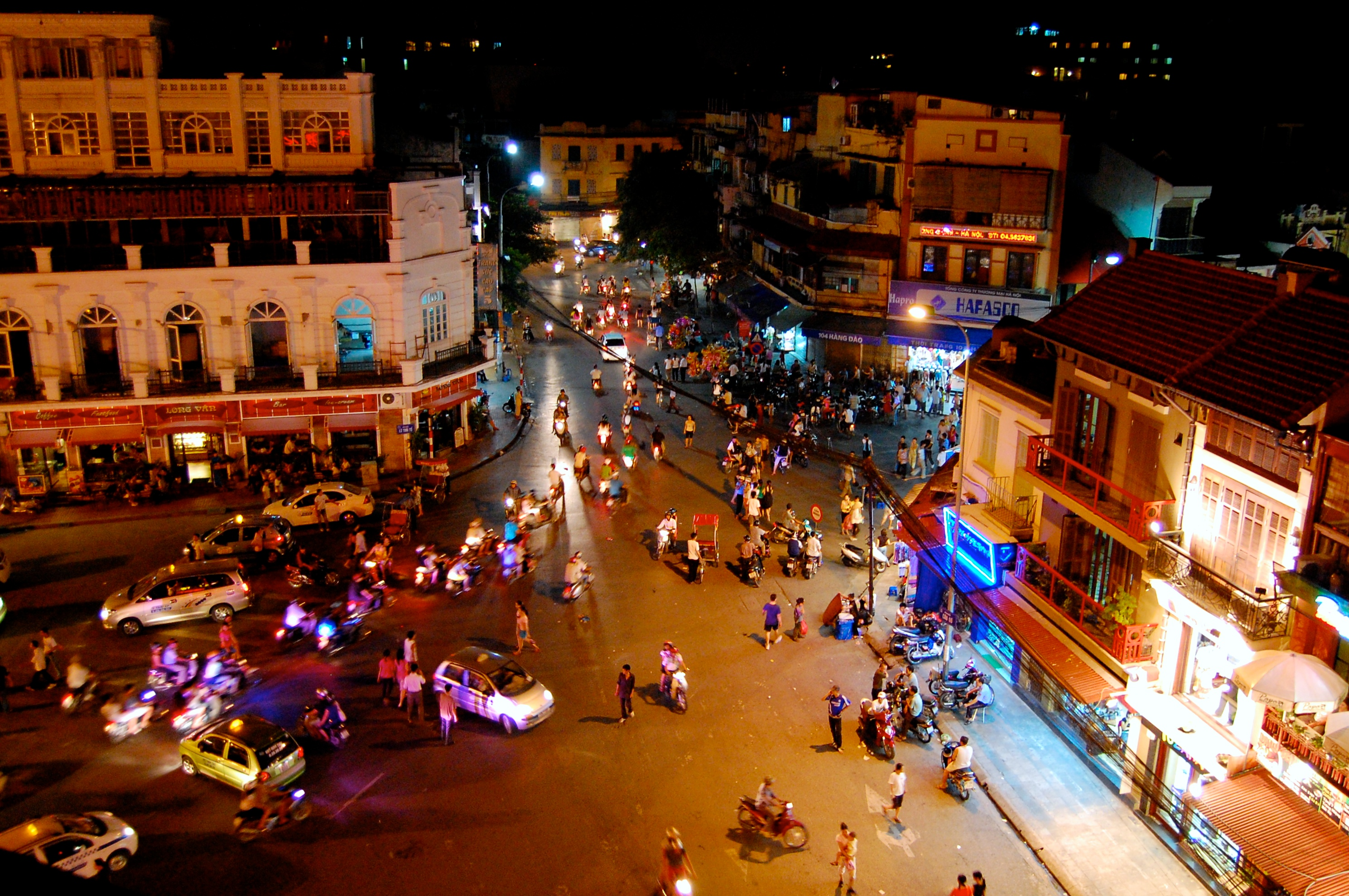 Dong Kinh Nghia Thuc Square at night